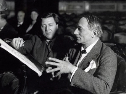 De componist Alban Berg (1885-1935) (links) bestudeert samen met de dirigent Corneille de Thoran de partituur van zijn opera "Wozzeck", Brussel 29 februari 1932